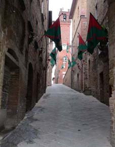 All'interno della Porta a Pago di Torrita, immagine creata da Flavio Casagni Licenza